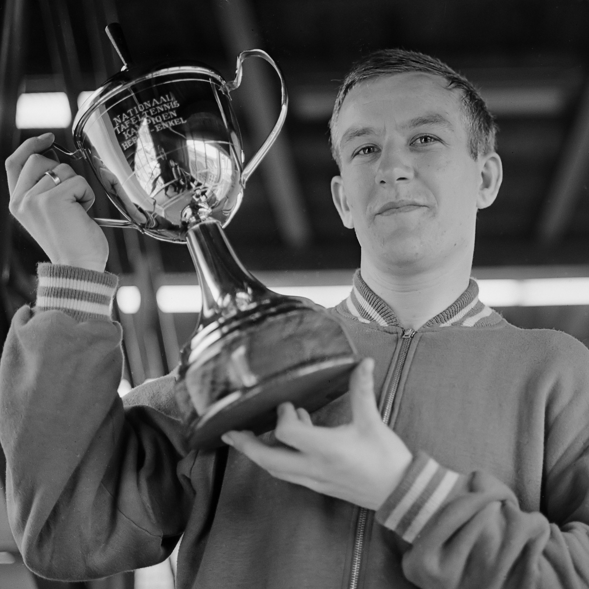 Tafeltenniskampioenschappen, winnaar bij de heren Frans Schoofs 19 april 1964